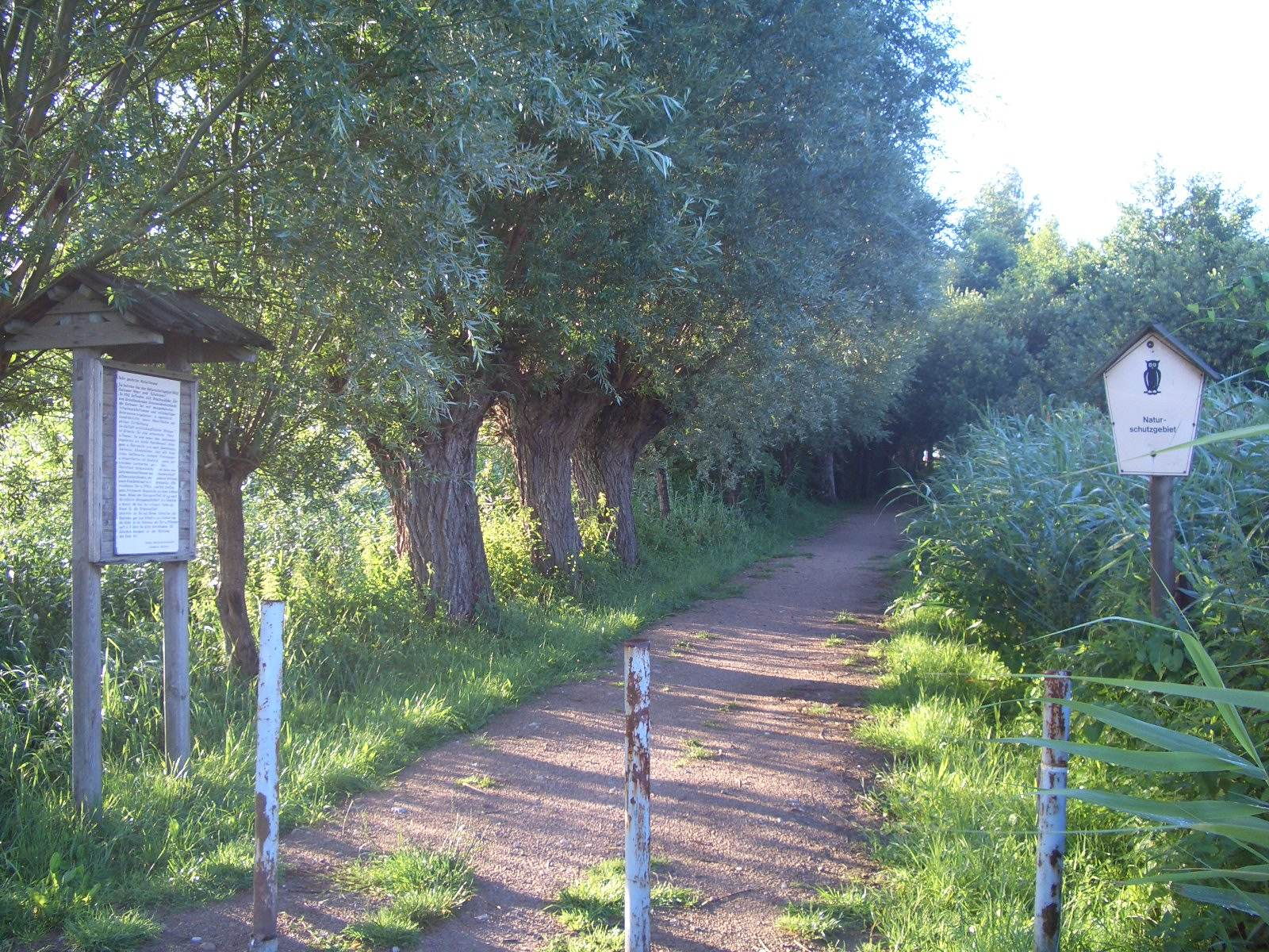 Naturschutzgebiet Gutower Moor und Schöninsel bei Güstrow. Bei Gutow. - Google Maps - Google Earth